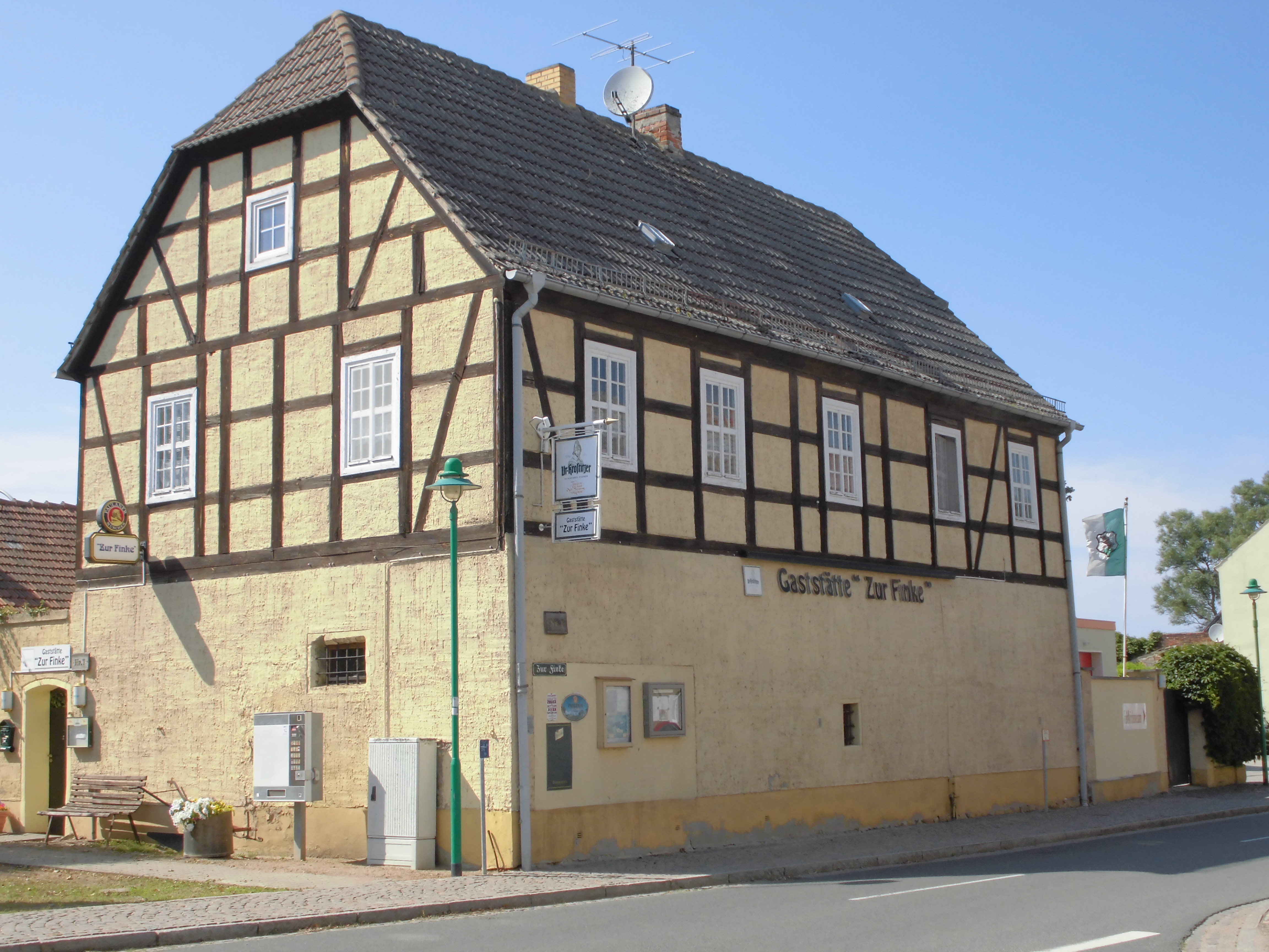 ehemaliges Schulgebäude in Schweinitz